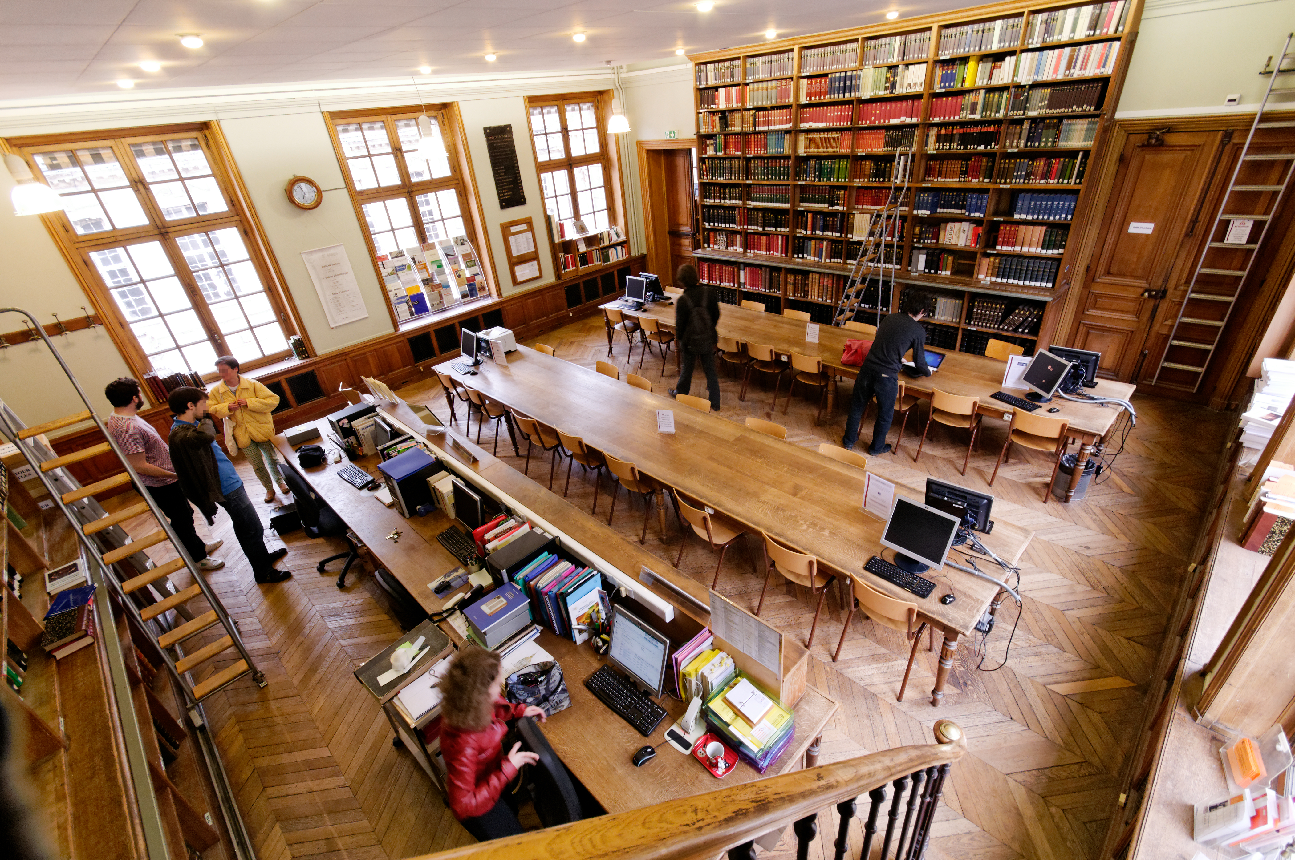 Bibliothèque de l'École nationale des Chartes.